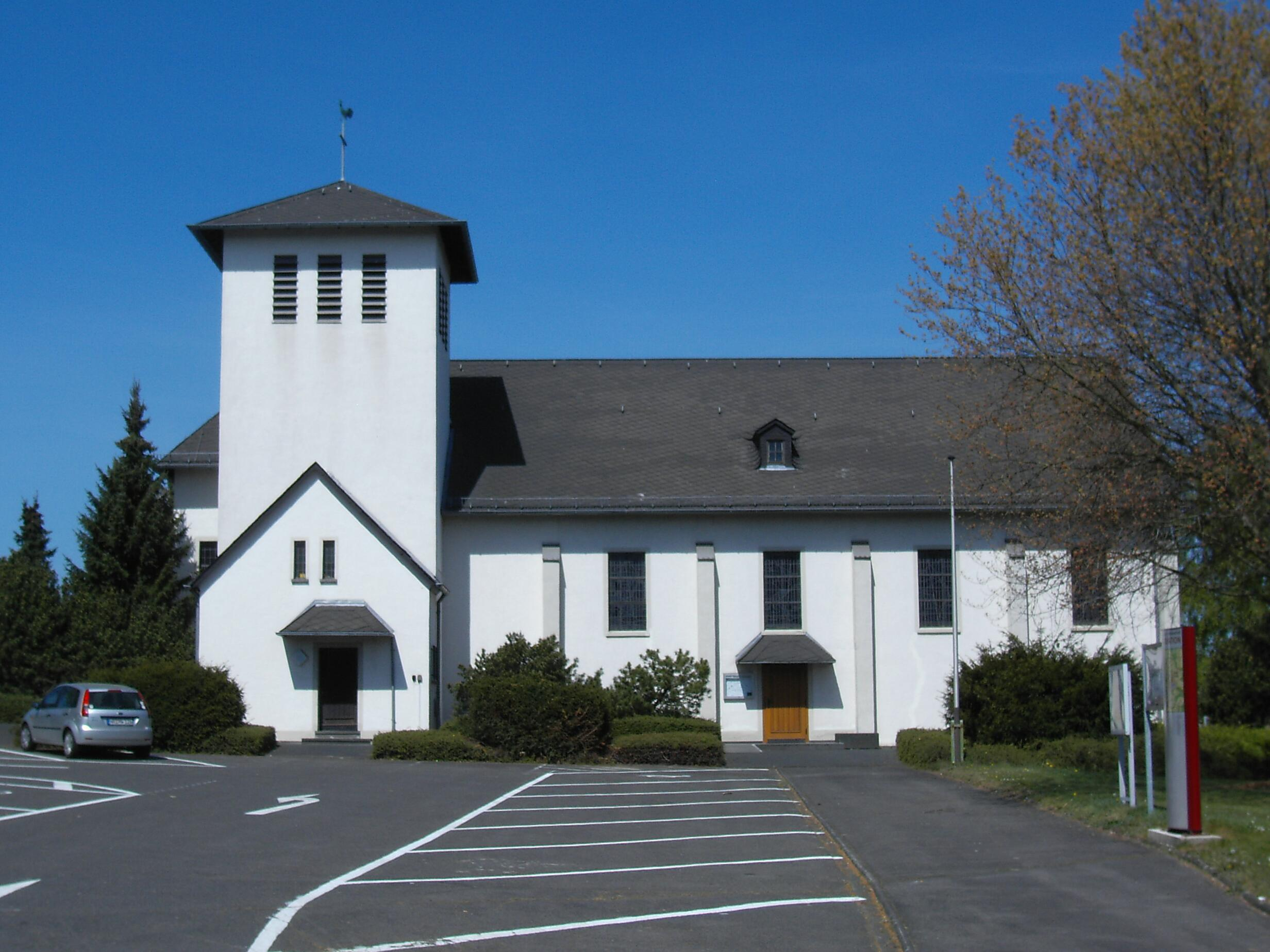 Filialkirche Maria Königin in Kalenborn, Vettelschoß